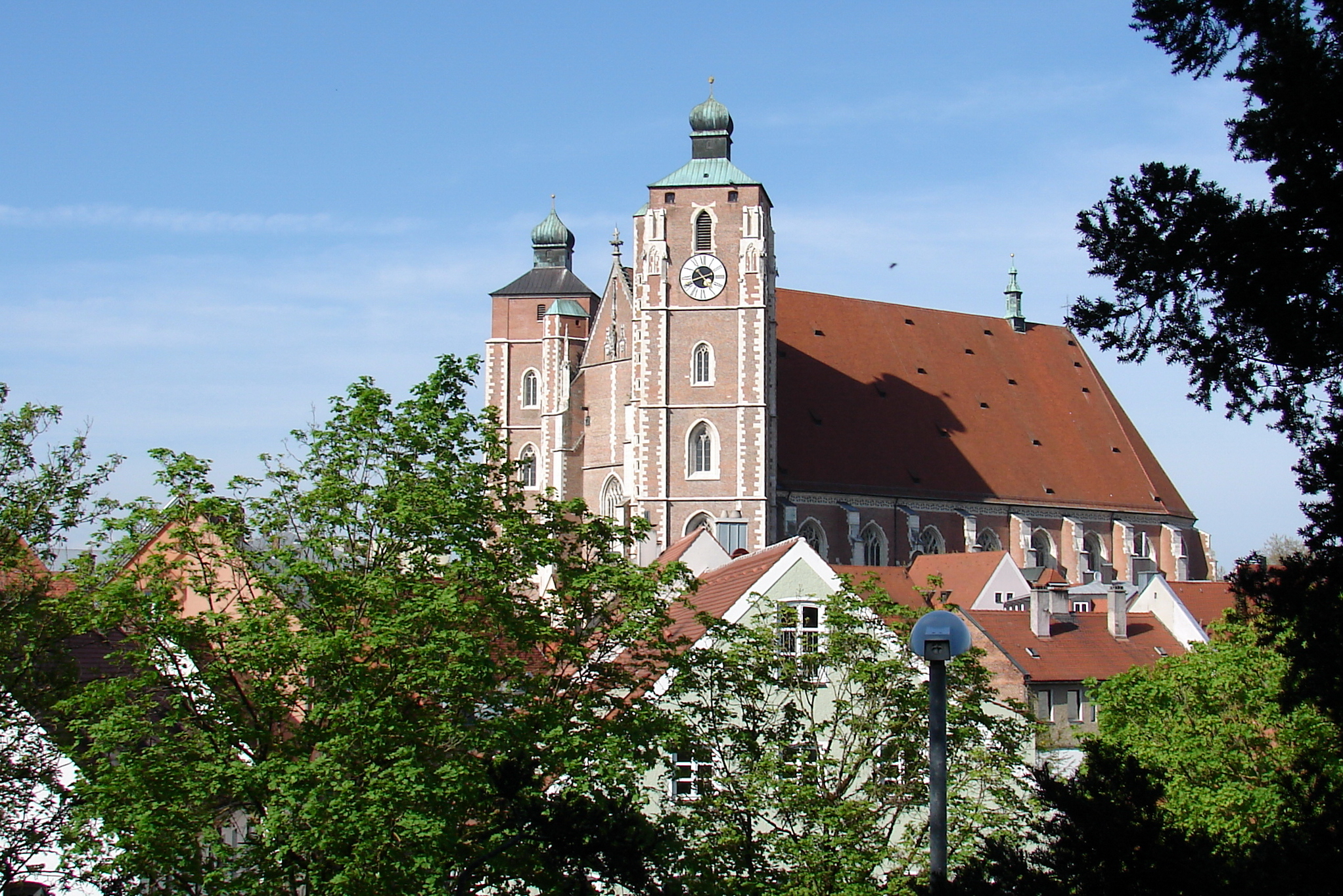 Münster Zur Schönen Unserer Lieben Frau Wuchtig, gotisch und weithin sichtbar